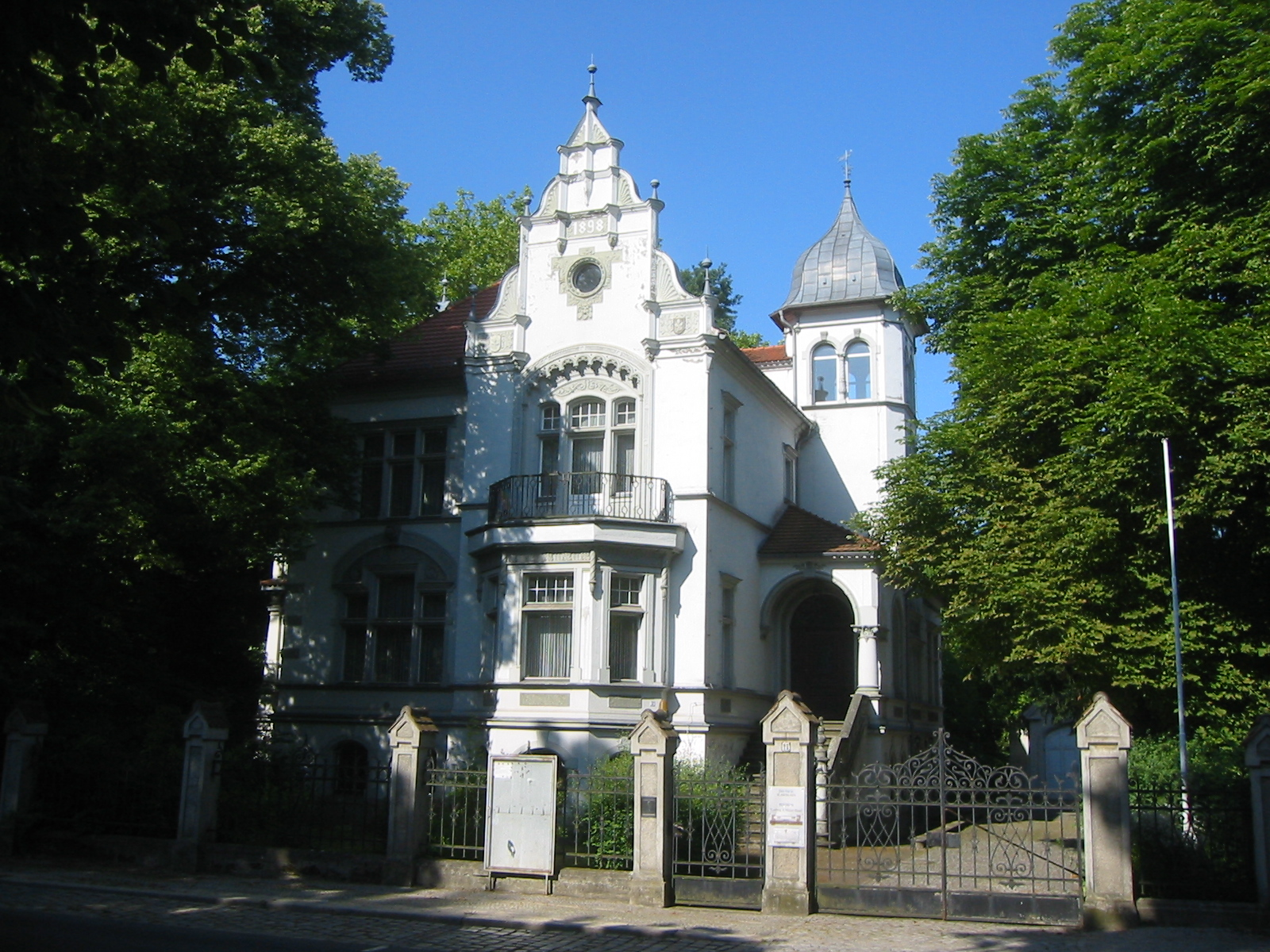 Denkmalgeschütztes Ludwig-A.-Meyer-Haus, Sitz des Deutsch-Slawischen Kulturzentrums in der Uferstraße 11 in Guben